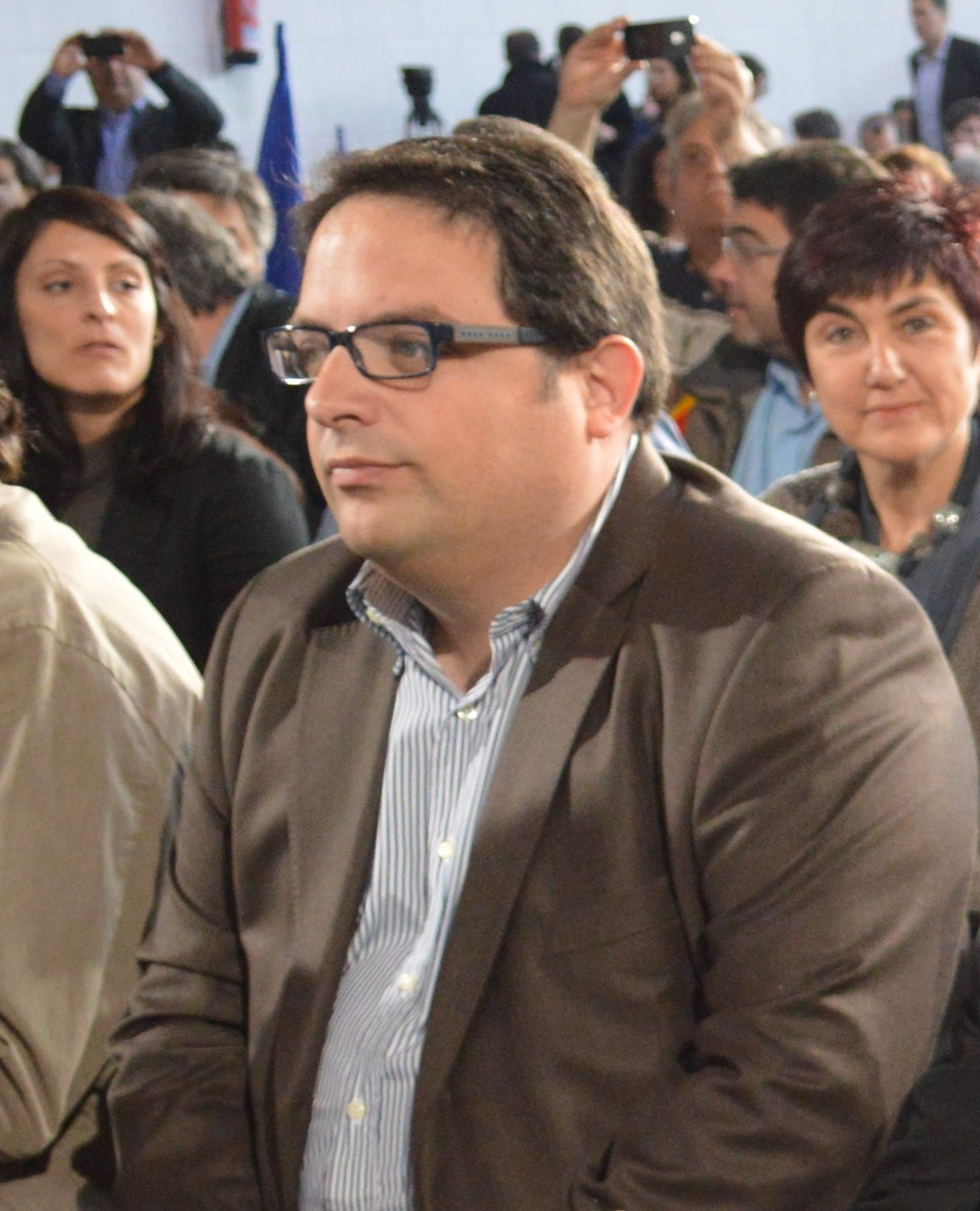 Míting Manresa. Gambús, Trias, Mas i Tremosa